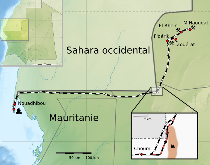 carte de le chemin de fer de mauritanie